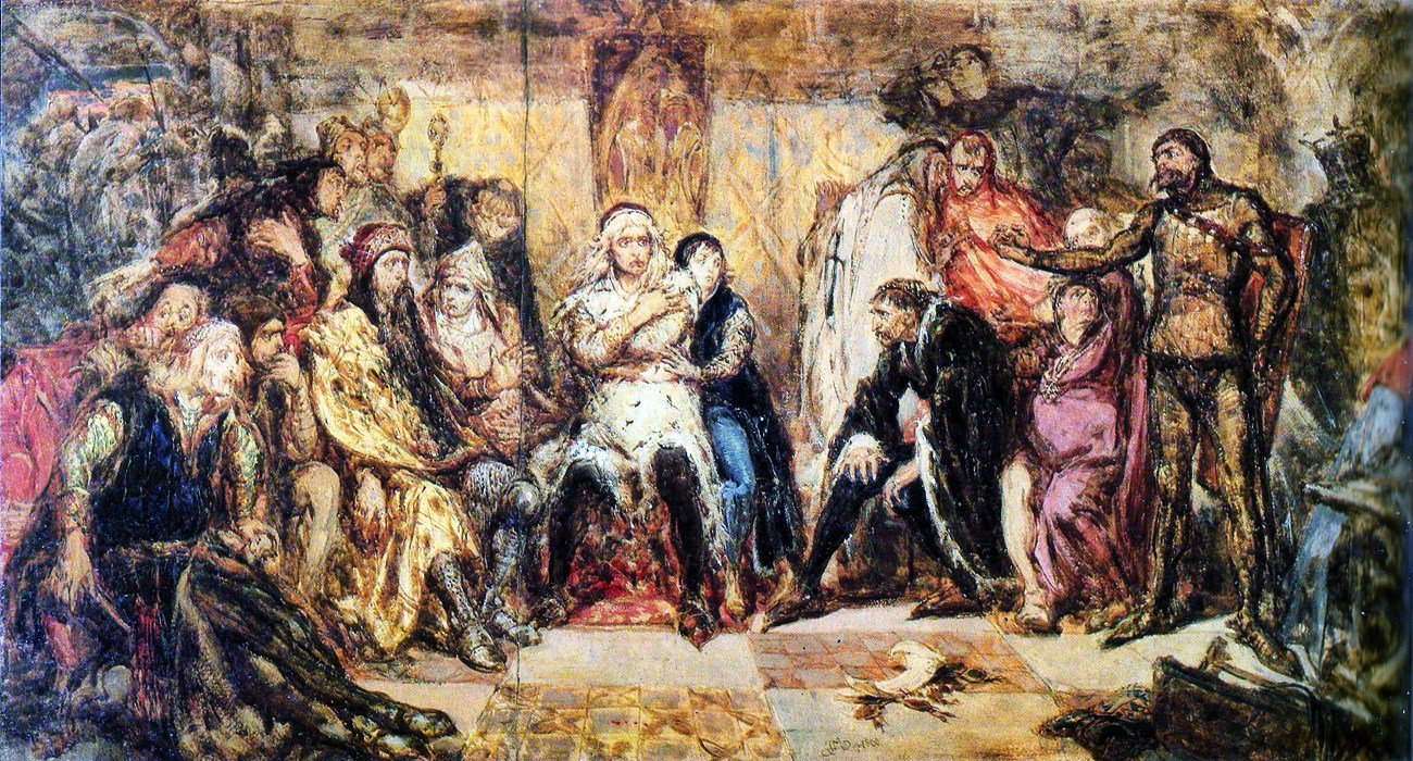 Sejm w Gąsawie. Na obrazie znajdują się m.in.: Leszek Biały, Władysław Laskonogi, Henryk Brodaty i Konrad mazowiecki.